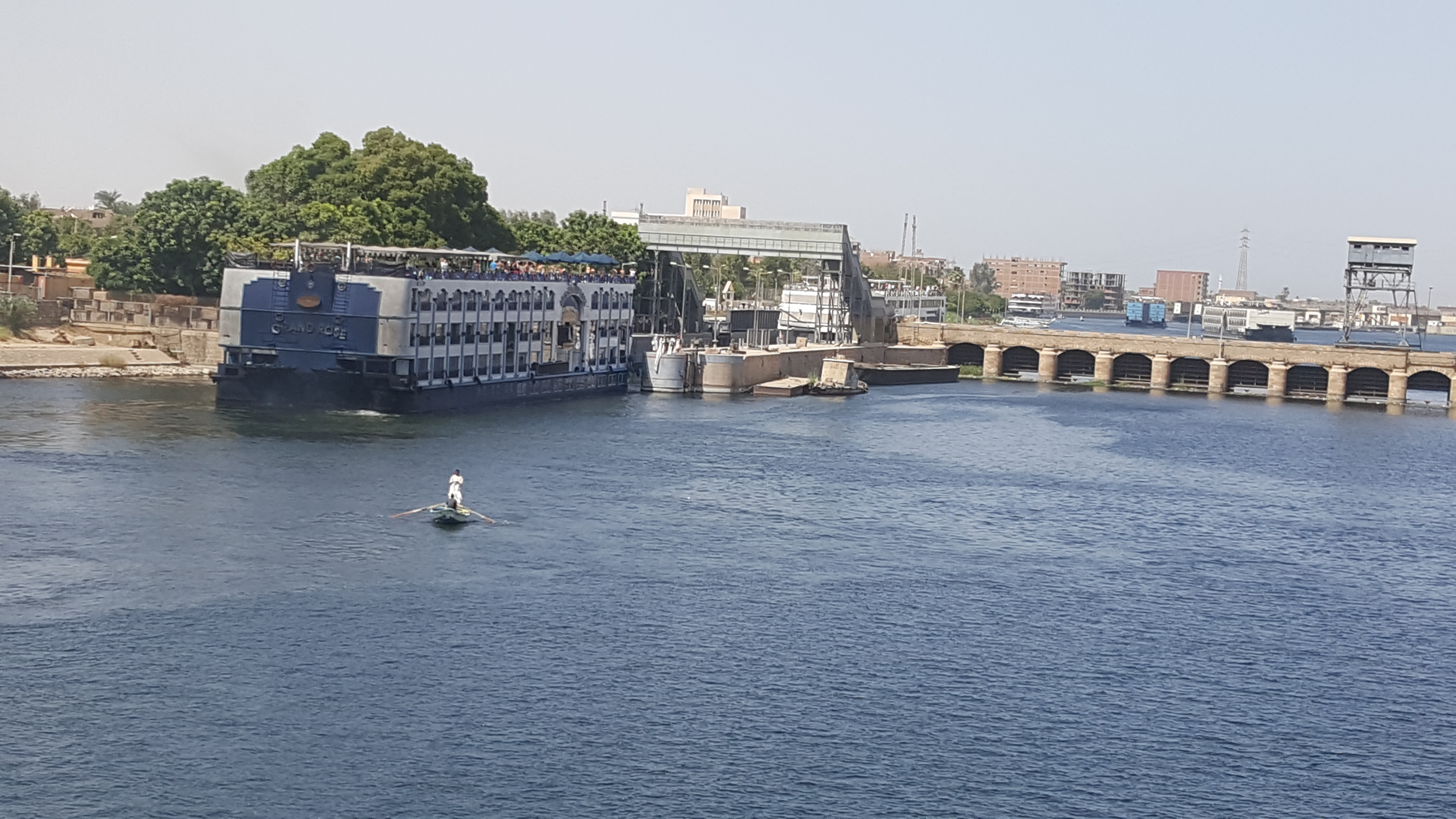 New Esna lock